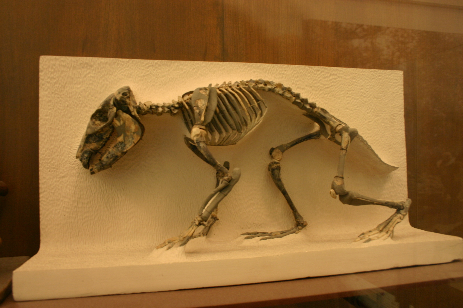 Propachyrucos ameghinorum